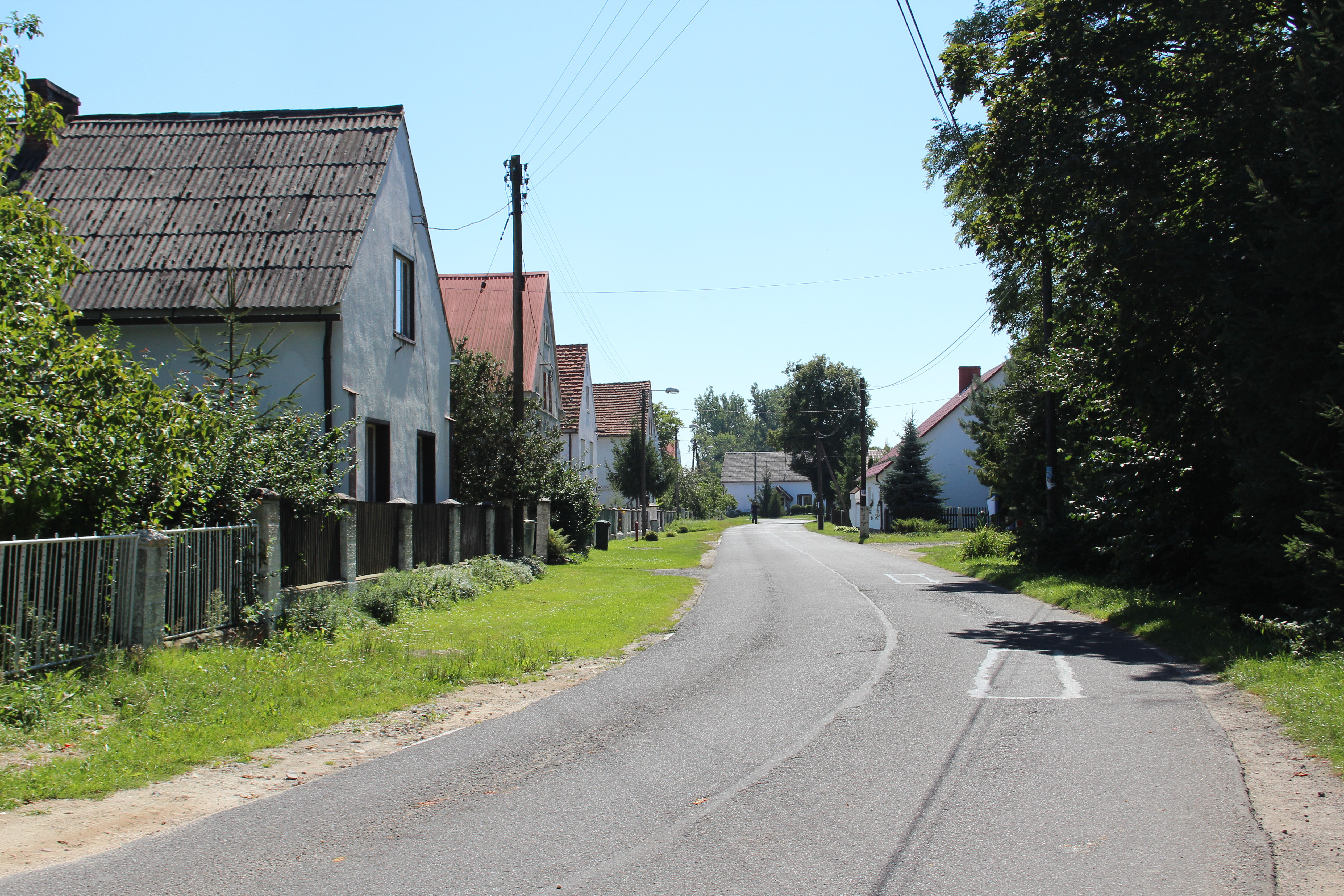 Szadurczyce - wieś w Polsce w województwie opolskim, w powiecie nyskim w gminie Łambinowice.